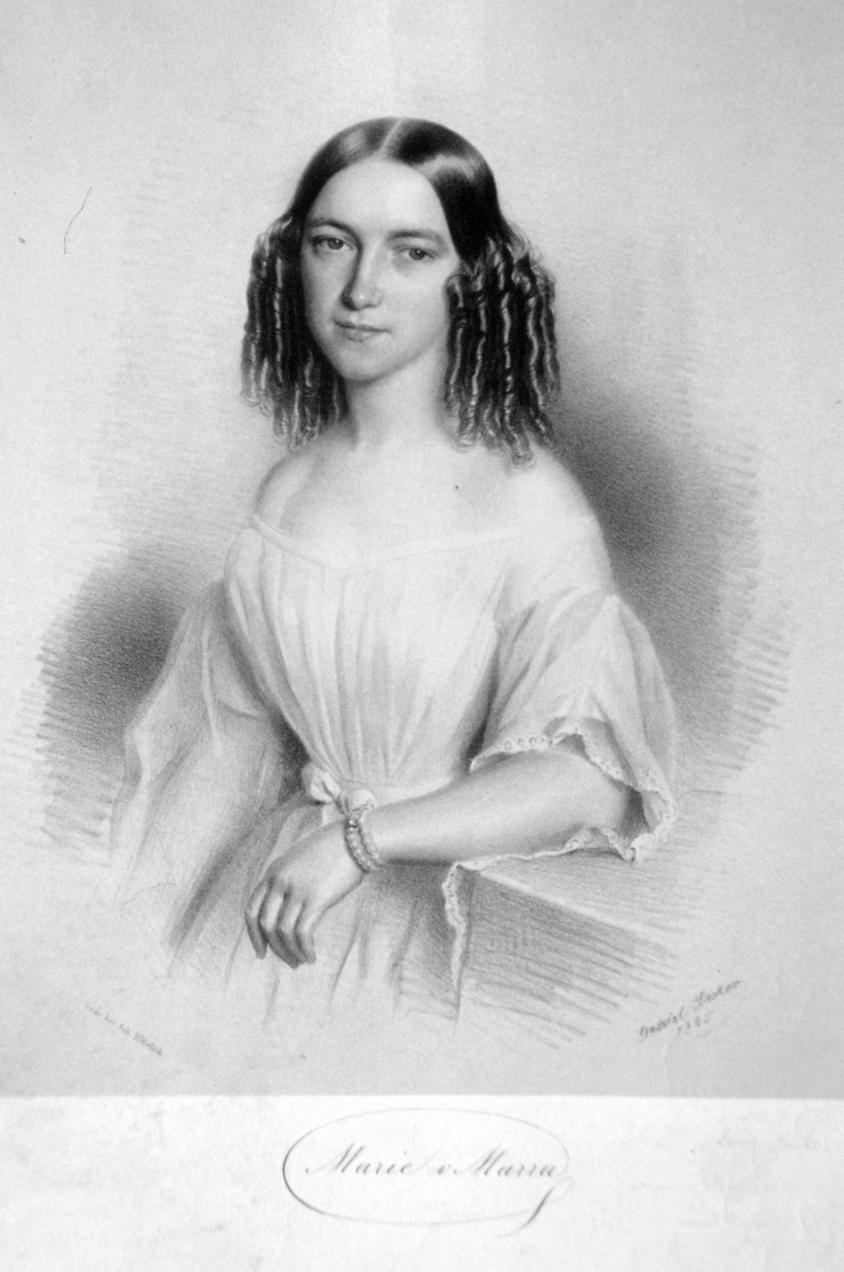 Marie von Marra-Vollmer (1822-1878), geb. von Hack. Östereichische Opernsängerin. Lithographie von Gabriel Decker, 1845